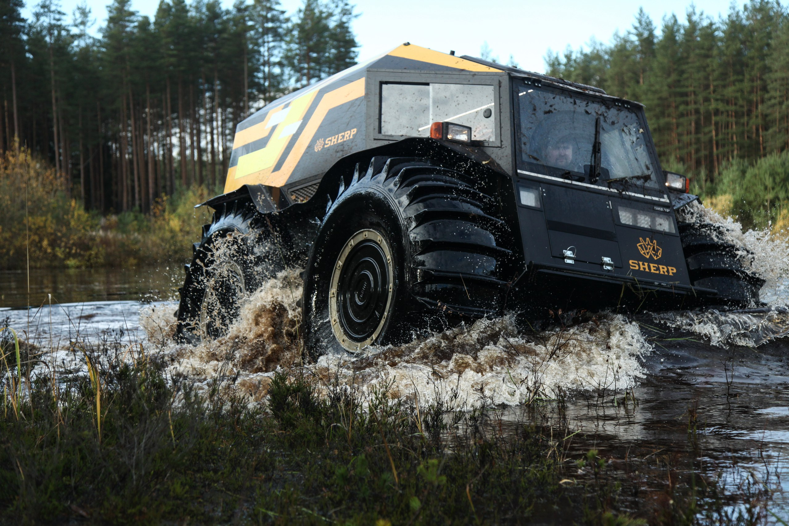 Шерп в 2018 году